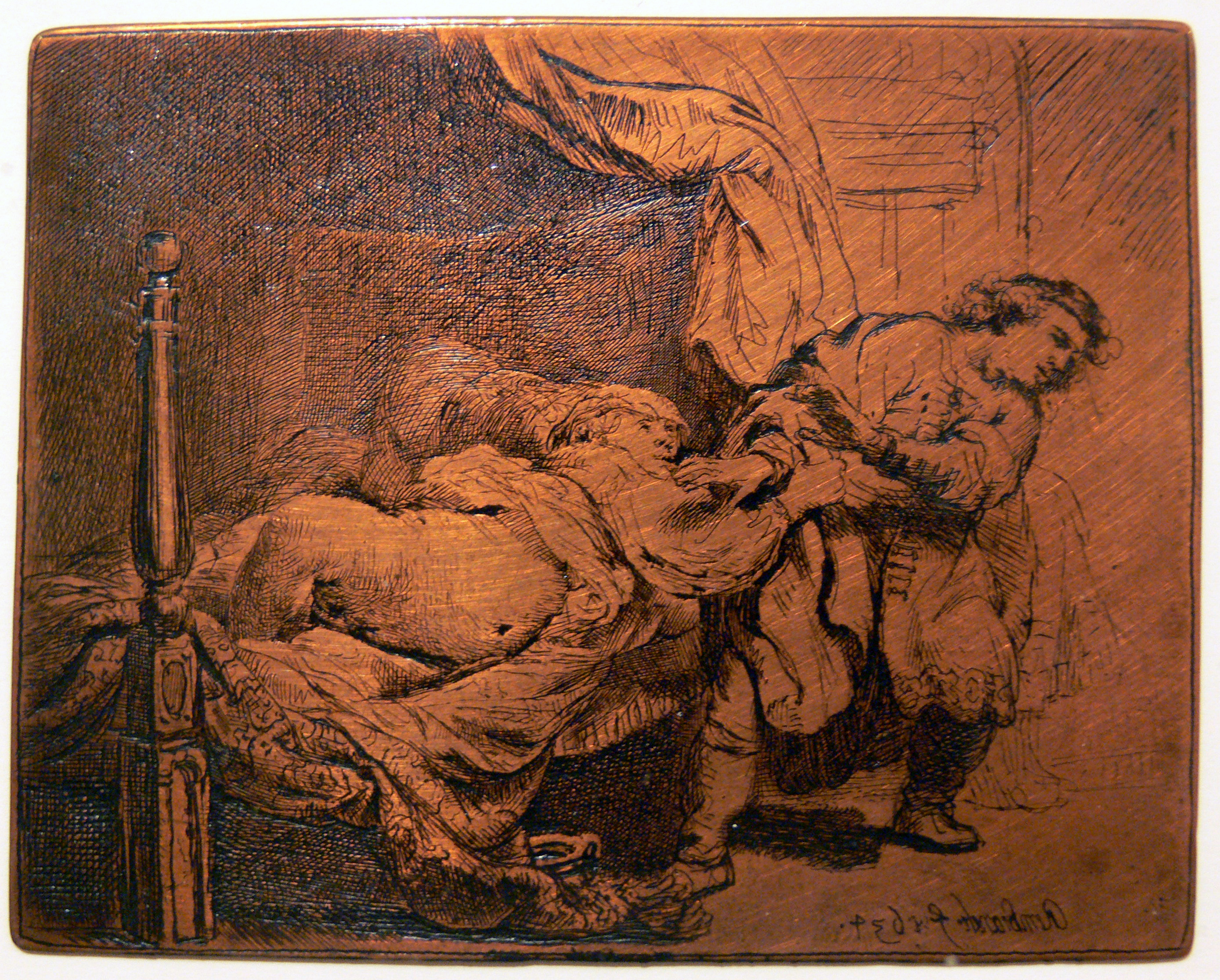 Rembrandt, plaque gravée à l'eau-forte, Joseph et la femme de Putiphar, 1634. Bartsch 39. Collection privée en dépôt à Amsterdam, Rembrandthuis